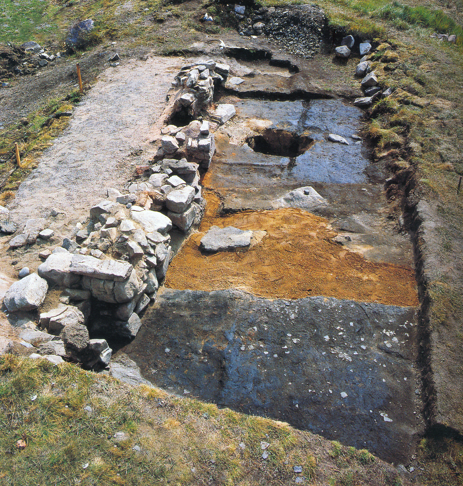 Acqua Fredda al Passo di Redebus (TN). Scavo dei forni fusori